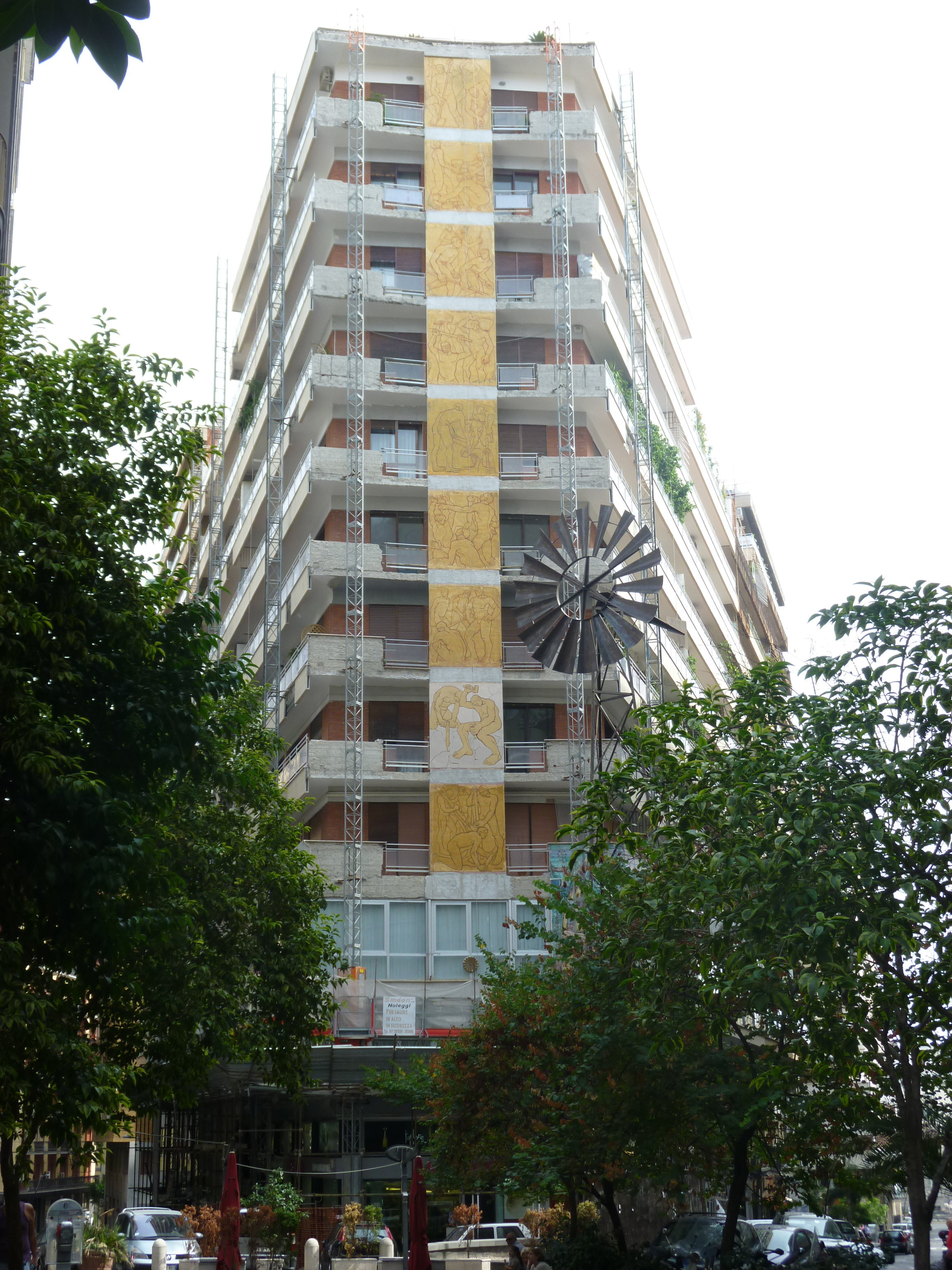 Napoli